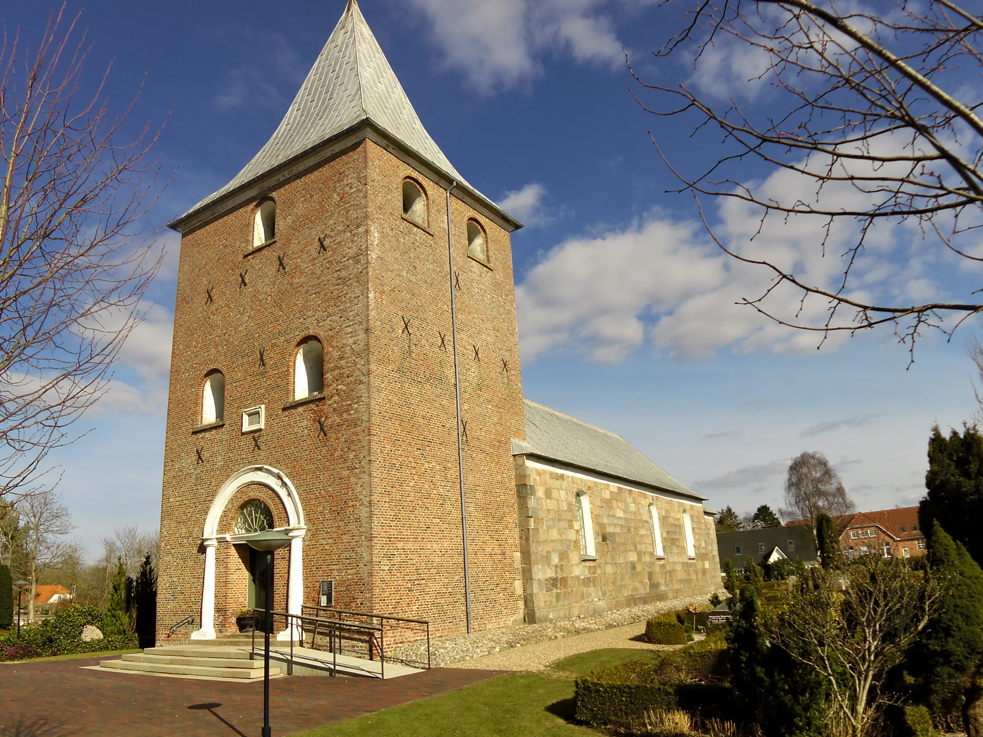 Fole Kirke